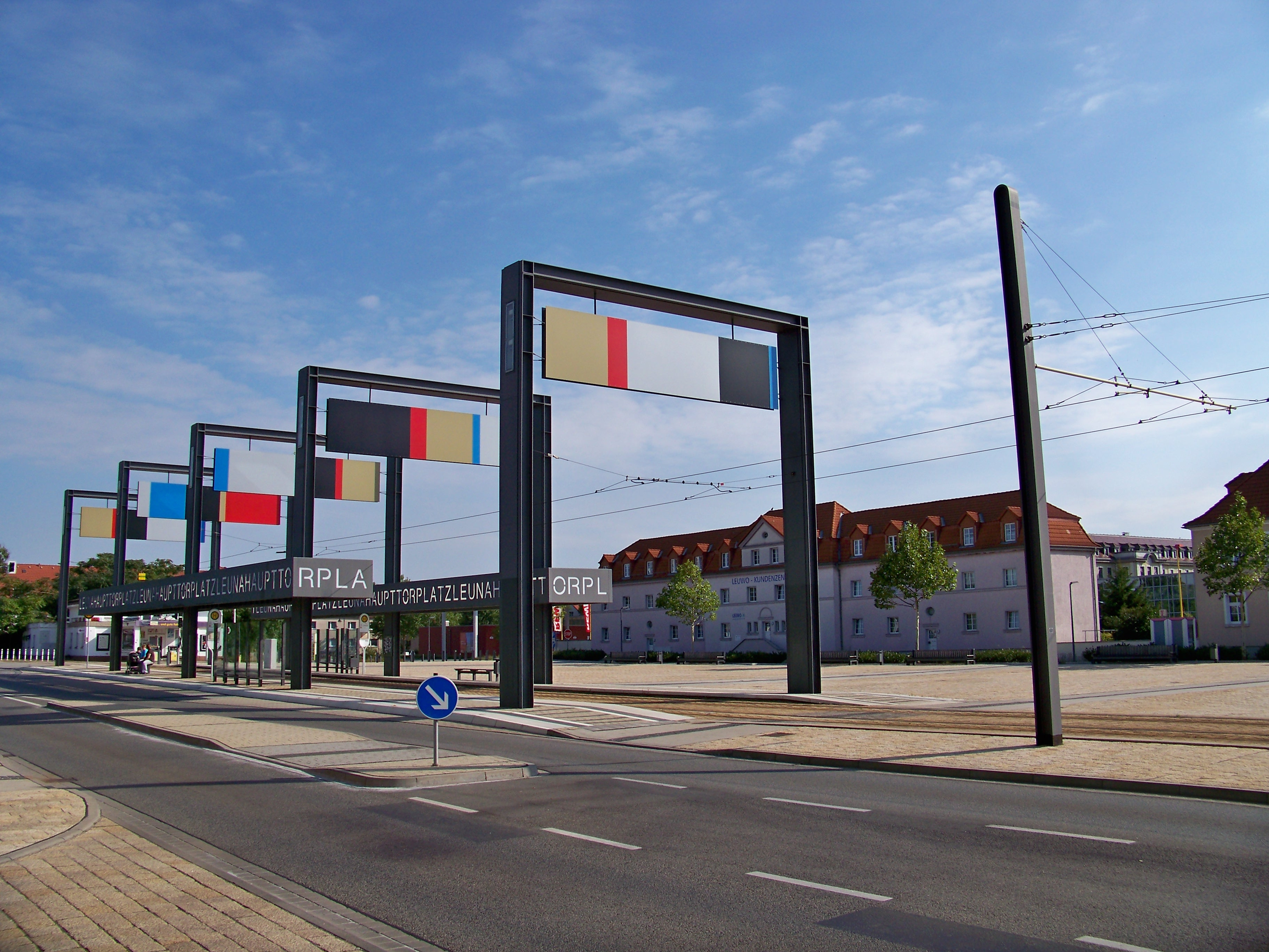 Platz vor dem Haupttor der Leuna Werke mit Straßenbahnhaltestelle